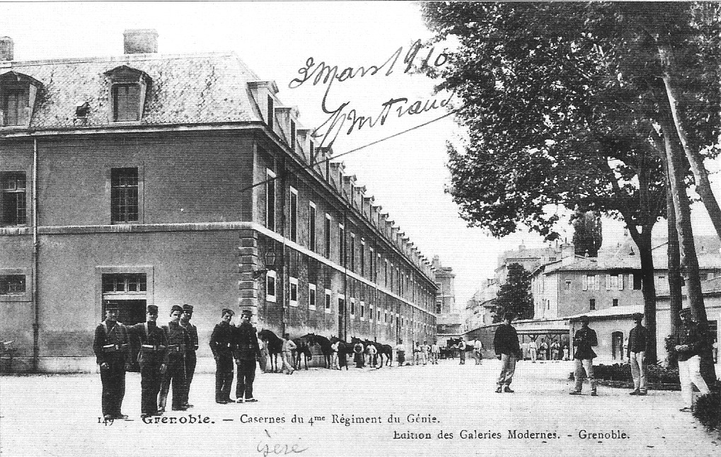 Caserne du 4e régiment de génie (caserne Dode ou de l'Alma) - Grenoble